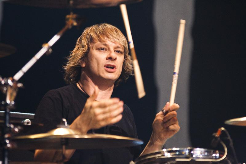 Korn Live @ Credicard Hall - 21/04/2010 - São Paulo, Brasil É proibida a cópia ou reprodução deste material sem a autorização do autor. Por favor, não publique nada daqui sem o devido crédito. Fotógrafo: Alexandre Cardoso